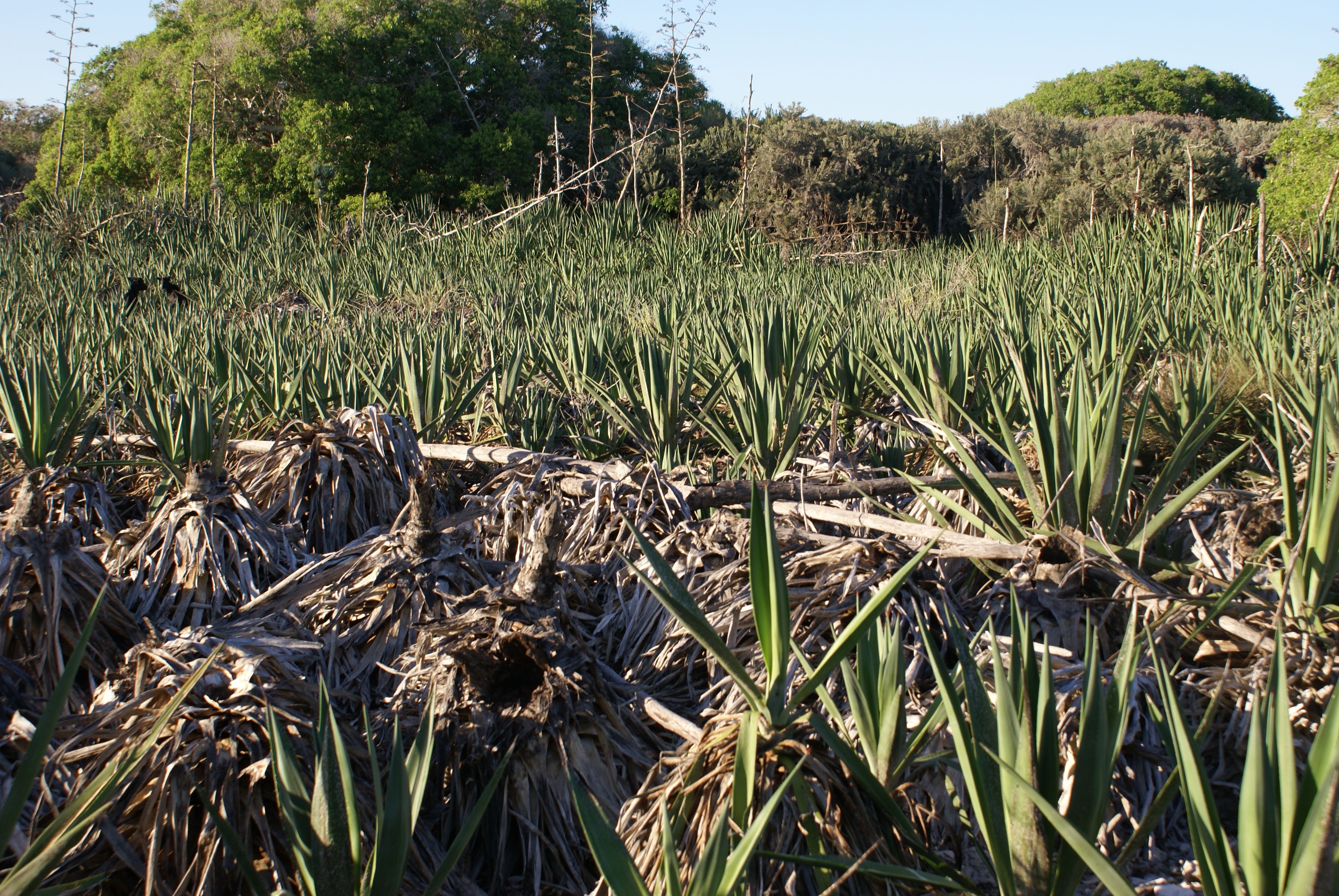 Sisal (Agave sisalana) on Europa Island